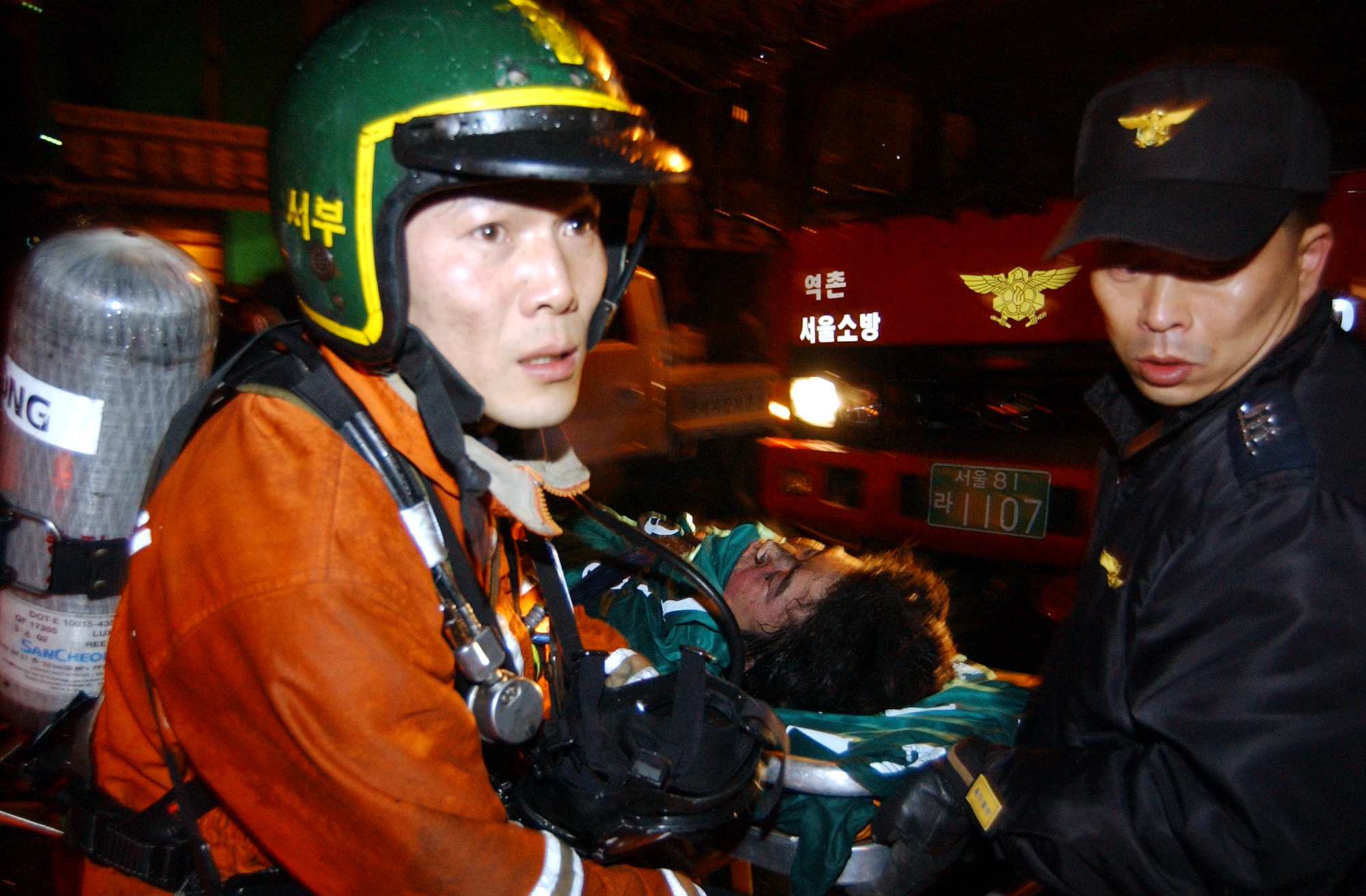 서울시 소방관 이성촌